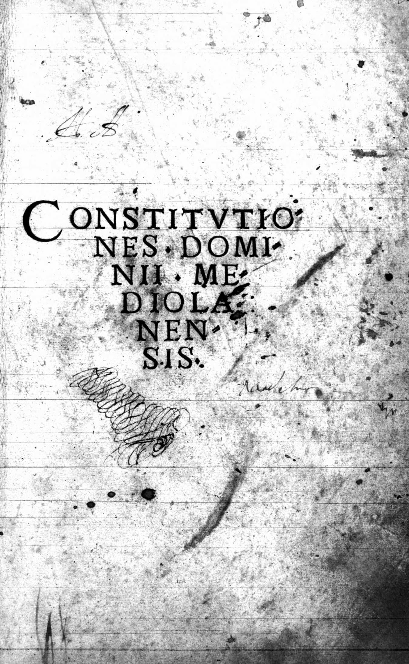 Frontespizio